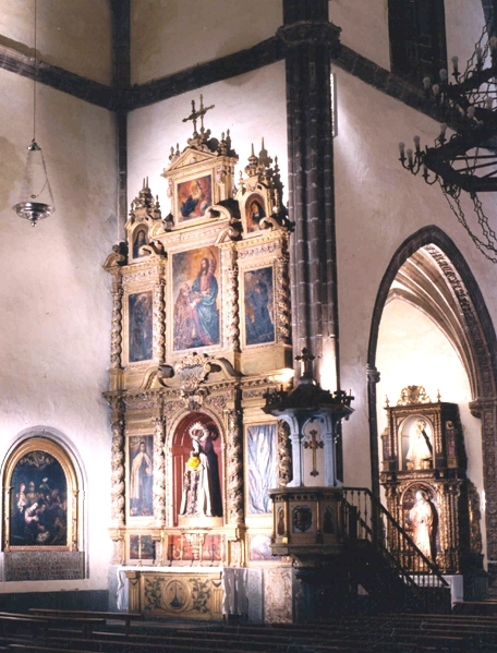 Retablo de la iglesia de la Candealria de Zafra